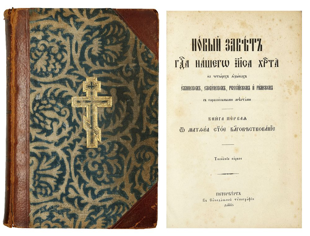 Обложка и титульный лист славяно-греко-латино-русской полиглотты